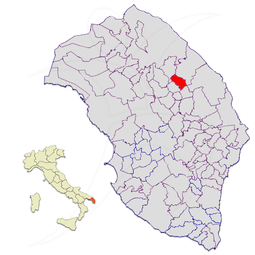 Il territorio del comune di Castri di Lecce nella provincia di Lecce